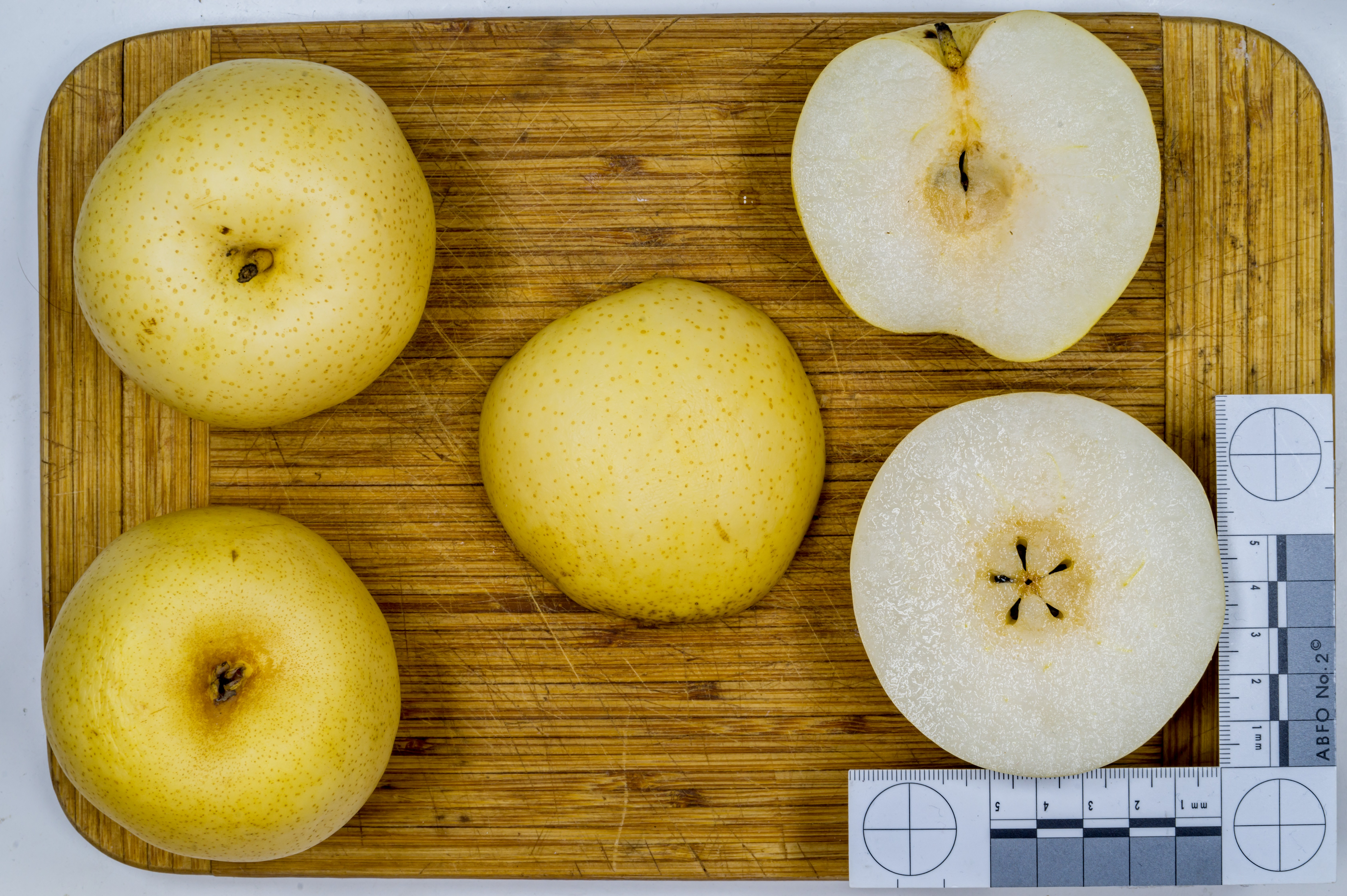 Birnensorte:Pyrus pyrifolia Nashi Birne, auch Japanische Birne, Koreanische Birne, Asiatische Birne, Chinesische Birne, Kumoi